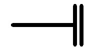 Взято из книги: Начальная военная подготовка - Москва: Просвещение, 1985 - с.256